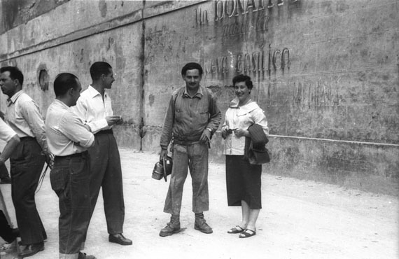 I Euskal Espeleologia Jardunaldiak (Arantzazu, 1956). Argazkiaren erdian, Felix Ruiz de Arkaute.